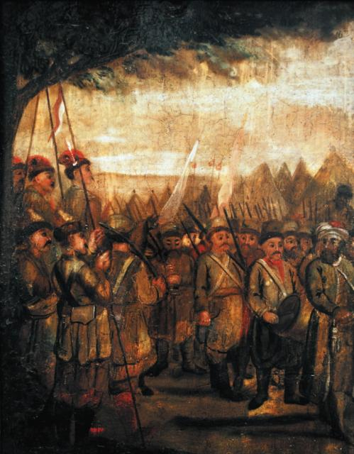 Украинские казаки, или сердюки, в походе.